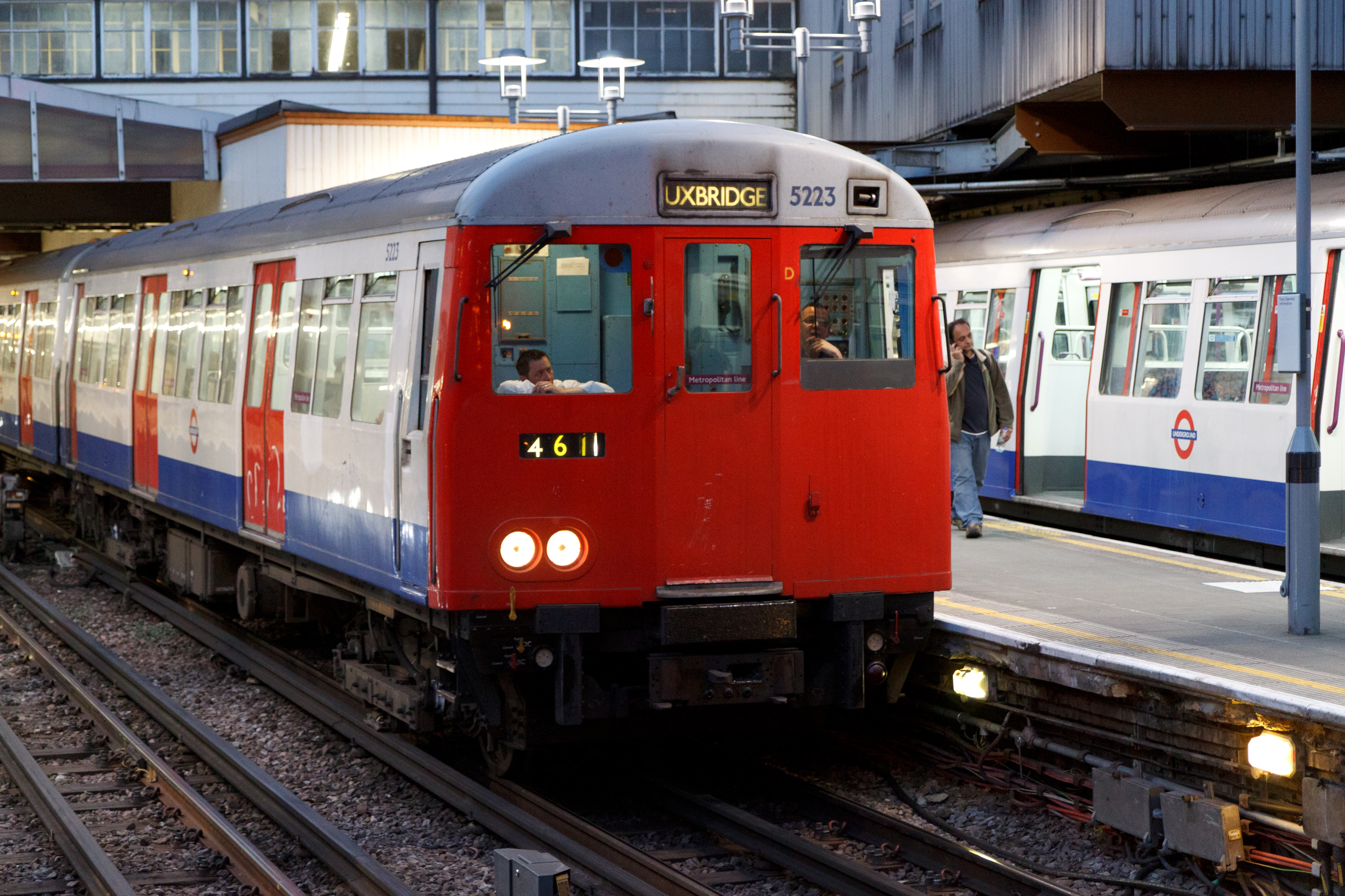 Old faithful